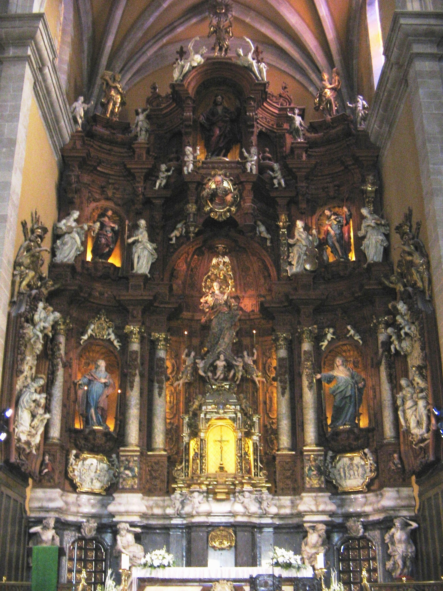 Retaule Major. Basílica de Santa Maria d'Igualada, 1719-1724, Josep Sunyer i Jacint Morató